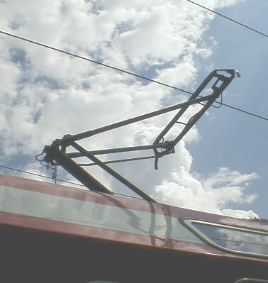 Description: pantographe du Mont-Blanc Express (ligne Saint-Gervais-Vallorcine) Source: photo prise par Christophe Jacquet en août 2001, en gare du Châtelard-Frontière Licence: Christophe Jacquet, 2001